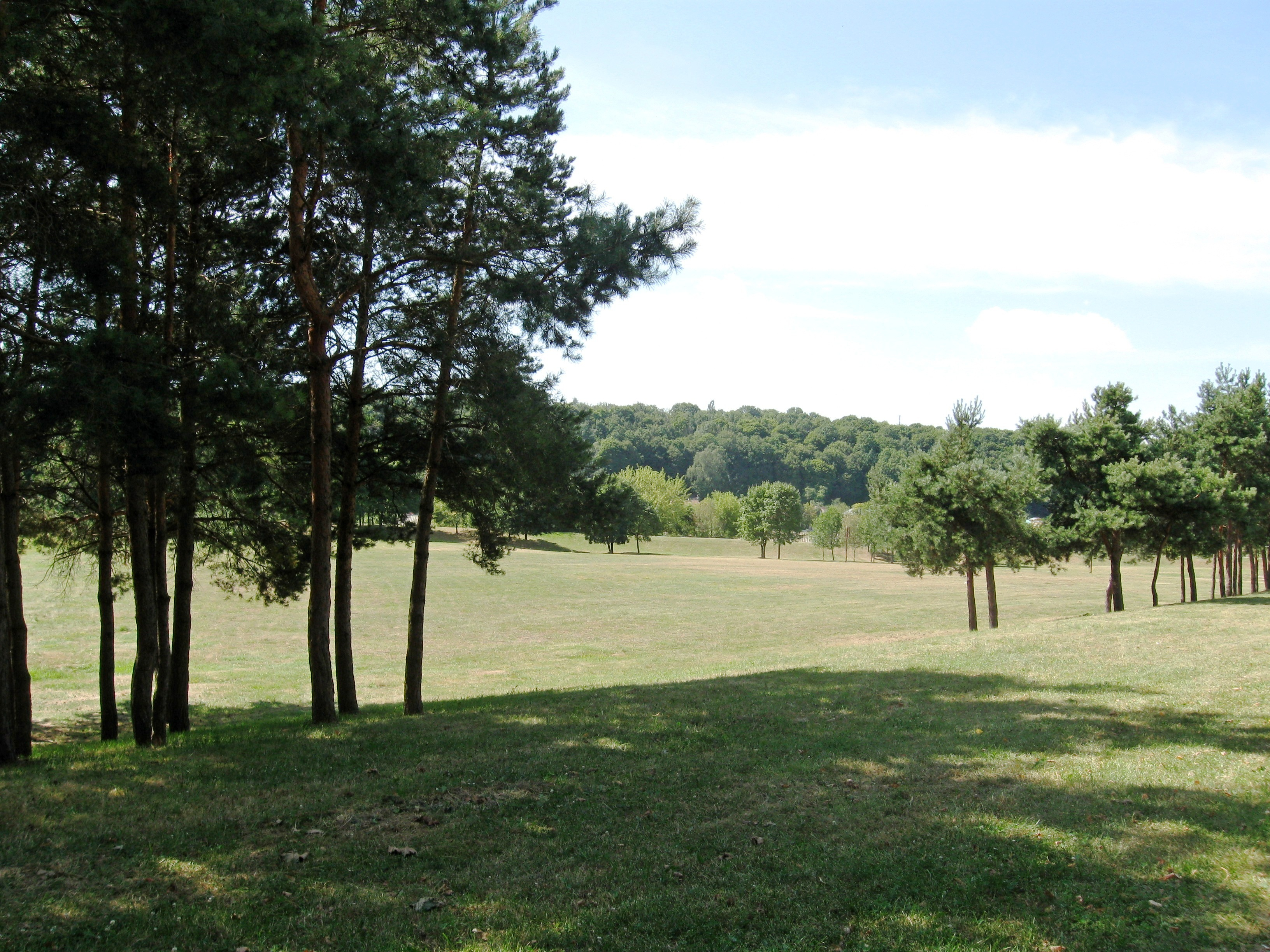 Santakos parkas